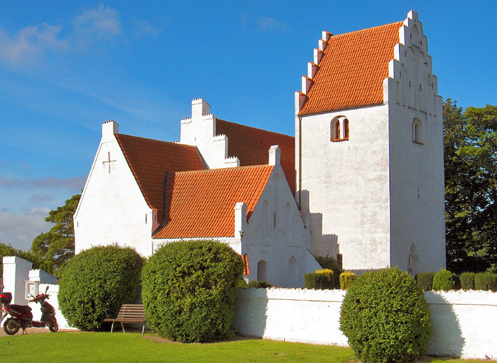 fra nordvest